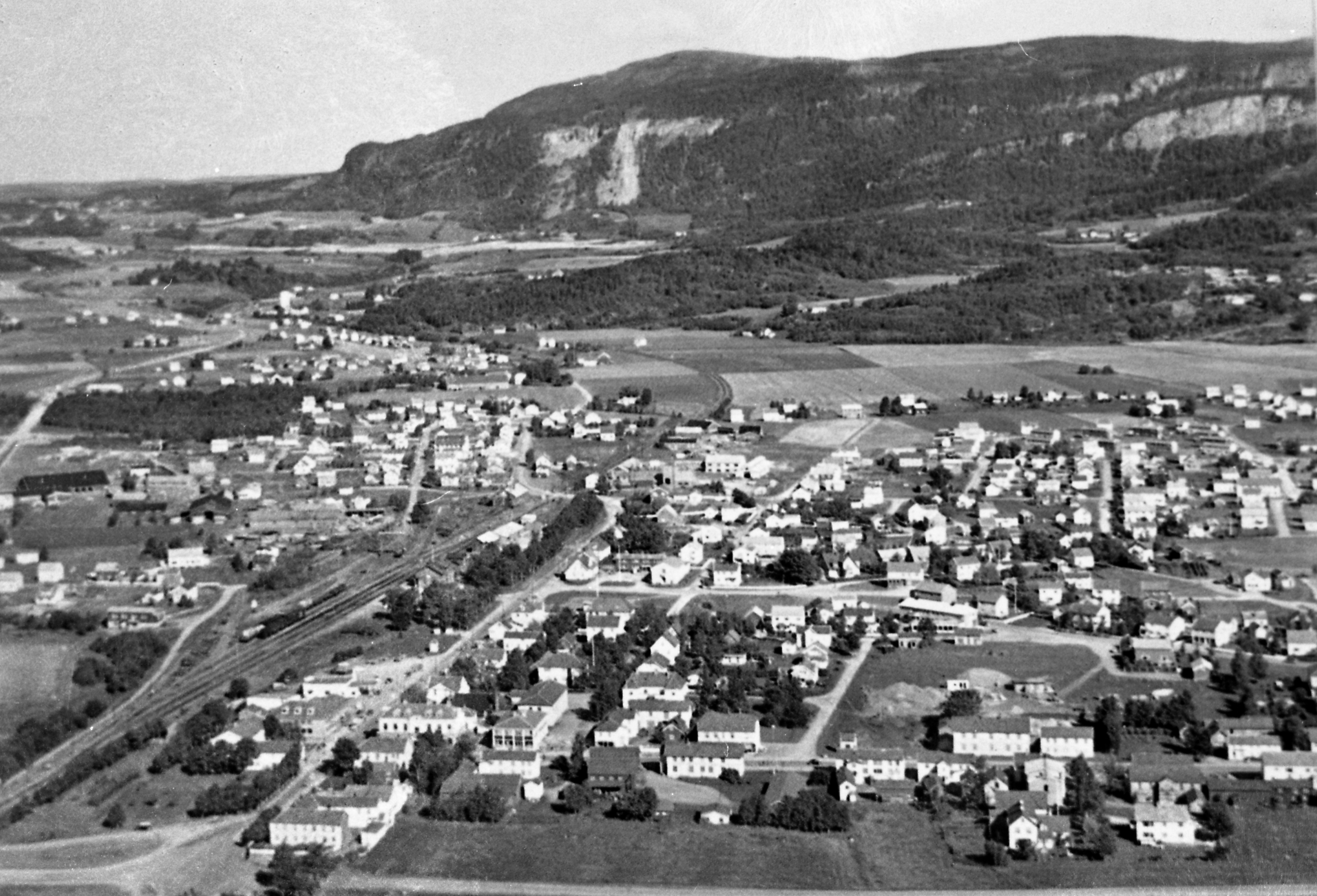 Format: 35 mm farge negativ Format: 35 mm sort/hvitt negativ (avfotografert fotopositiv) Film: Ilford FP3 Fine Grain Panchromatic Sted / Place: Stjørdal, Nord-Trøndelag